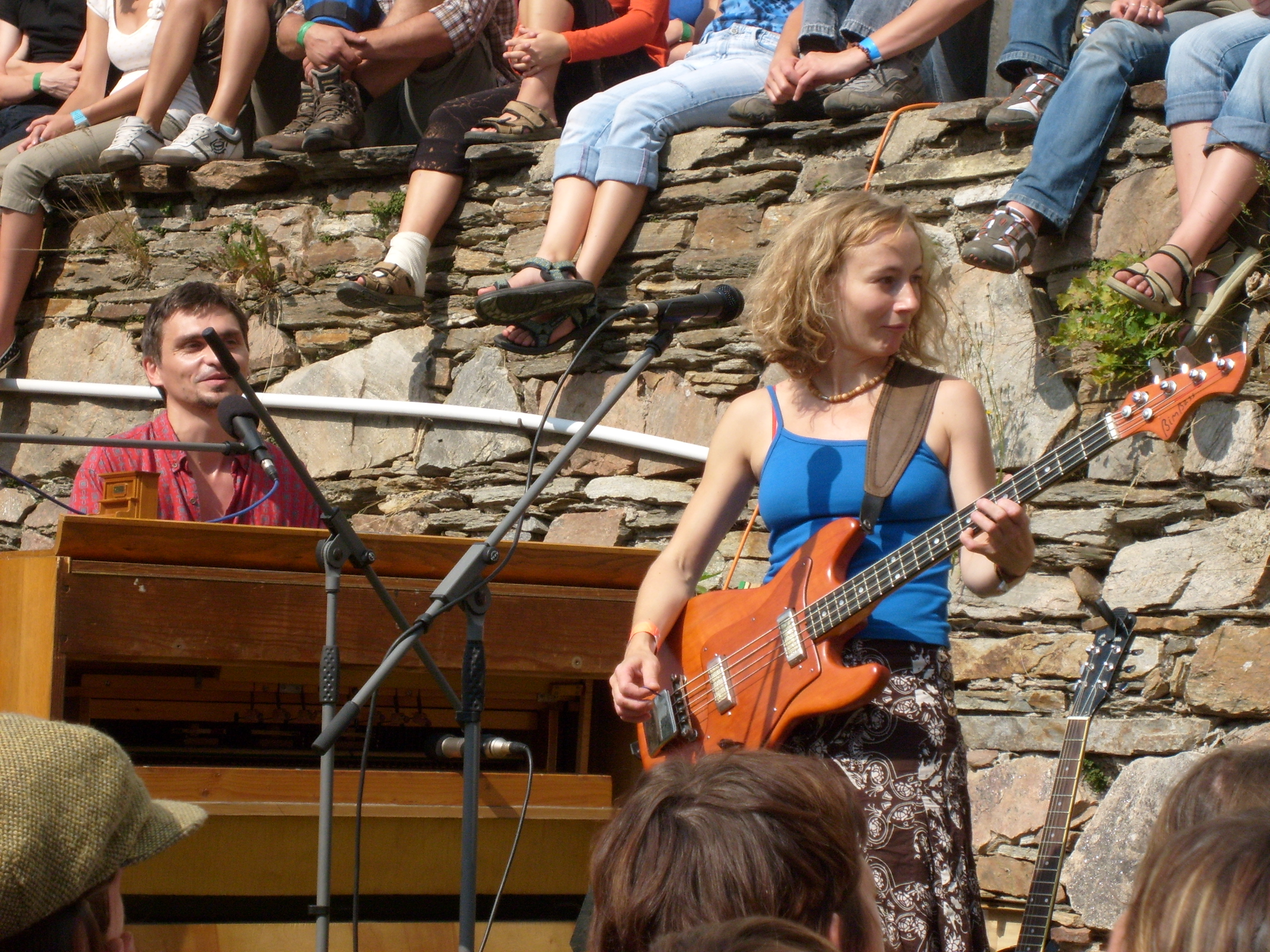 Traband, festival Otevřeno, Jimramov 2007